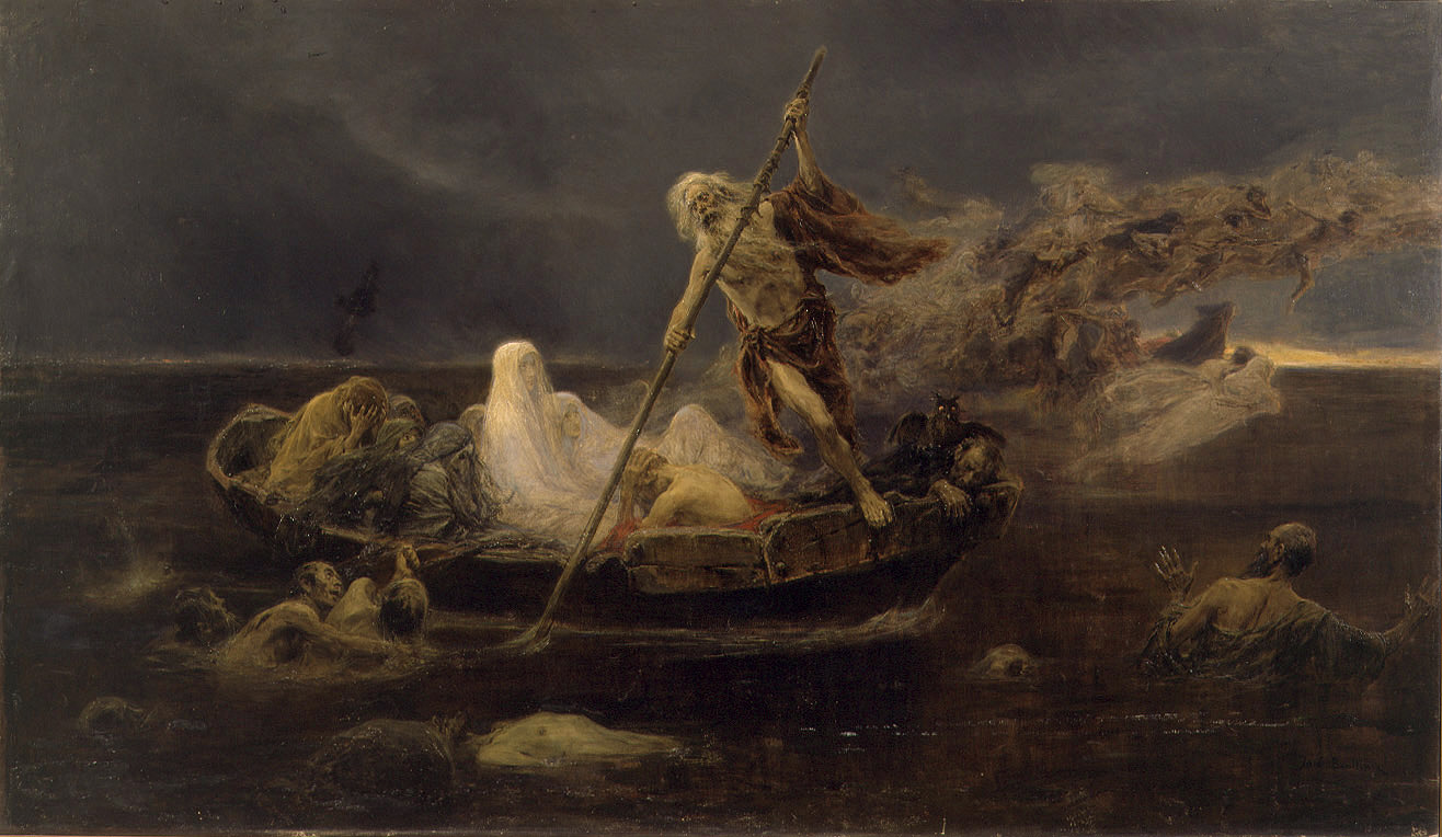 La obra representa a Caronte, el barquero del dios Hades, transportando en su barca a las almas desde el mundo de los vivos a la Laguna Estigia.